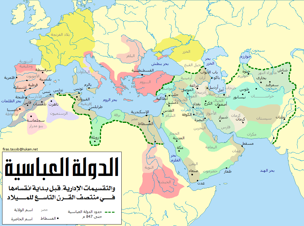 Il califfato abbaside File:Abass-will-007.png